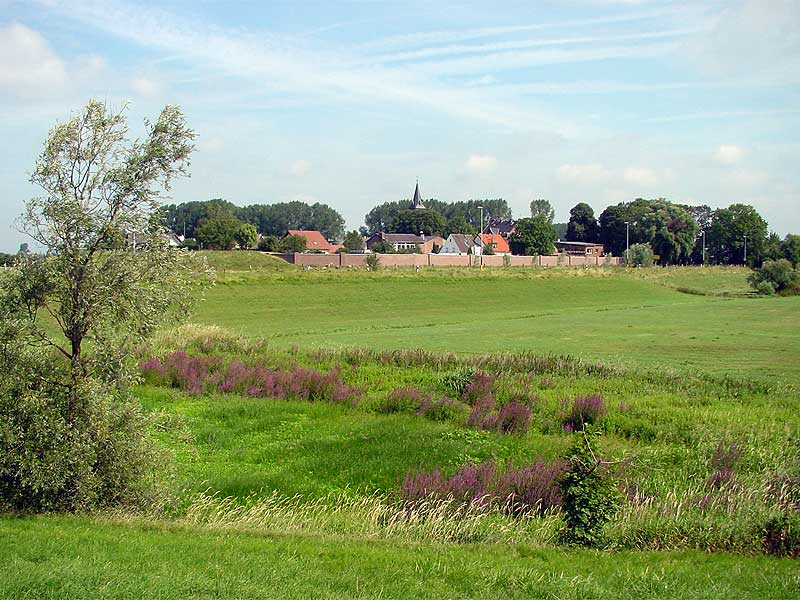 Schenkenschanz von der „Deichstraße“ (Martin-Schenk-Straße) aus gesehen. Schenkenschanz ist der kleinste Ortsteil von Kleve am Niederrhein (NRW). Das Grünland im Vordergrund liegt im Naturschutzgebiet „Salmorth“.